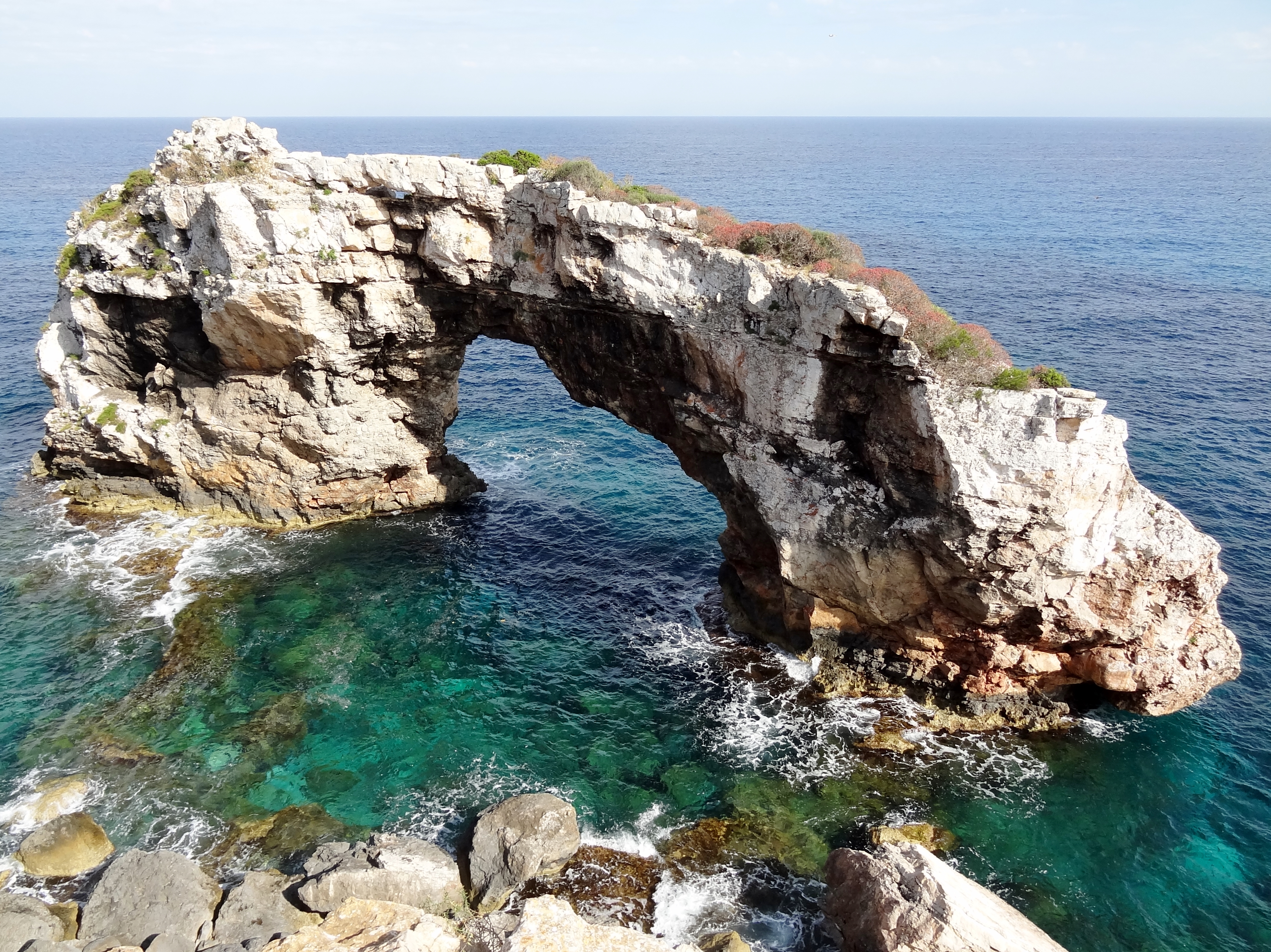 Es Pontàs bei Cala Santanyí in der Gemeinde Santanyí, Mallorca, Spanien